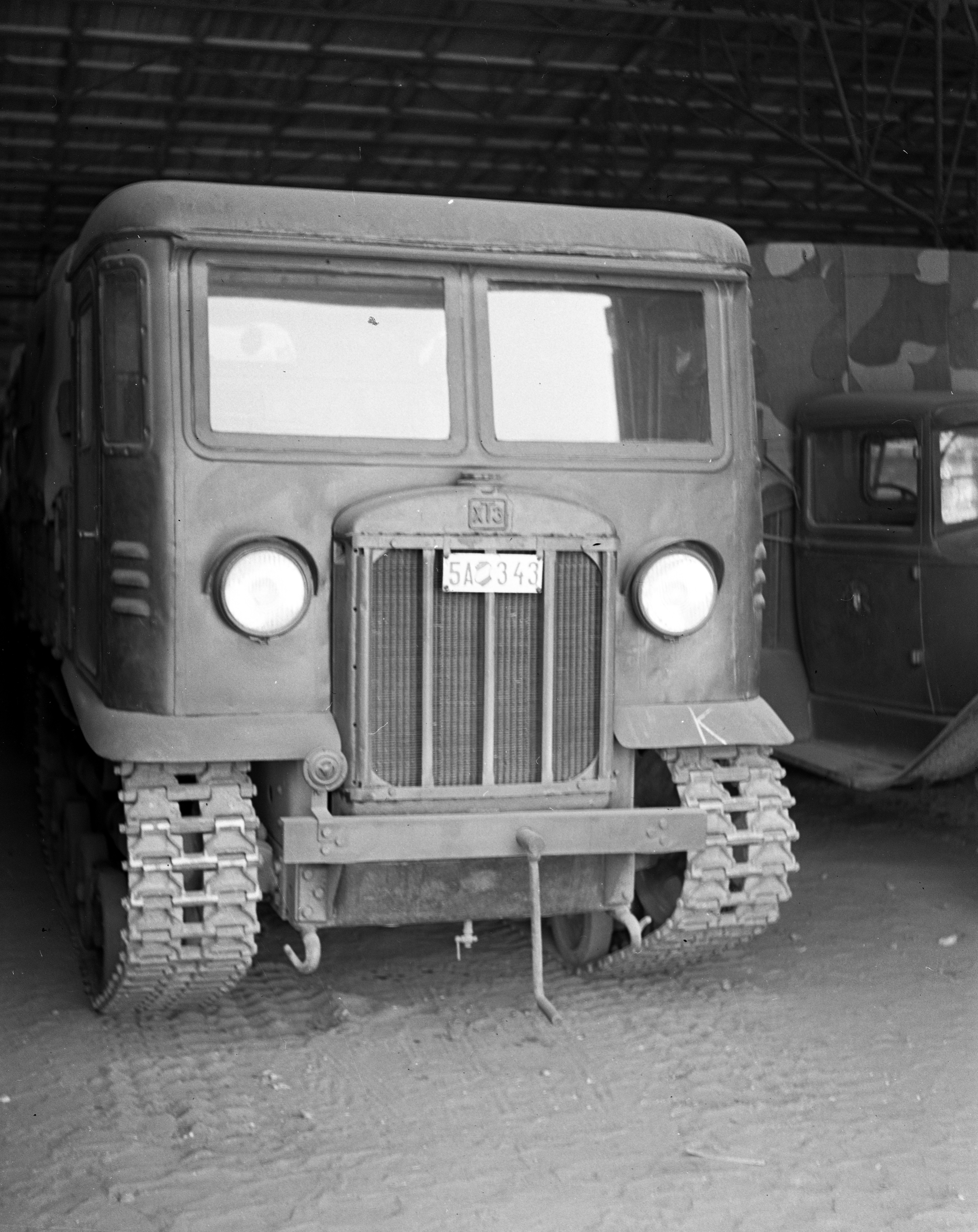 Mátyásföld, Újszász utca 41-43. Magyar Királyi Honvéd gépkocsiszertár, szovjet gyártmányú SZTZ−5 típusú tüzérségi vontató. Location: Hungary, Budapest XVI. Tags: tractor, Soviet brand, tow truck, Stalinec-brand, military, Budapest Title: Mátyásföld, Újszász utca 41-43. Magyar Királyi Honvéd gépkocsiszertár, szovjet gyártmányú SZTZ−5 típusú tüzérségi vontató.